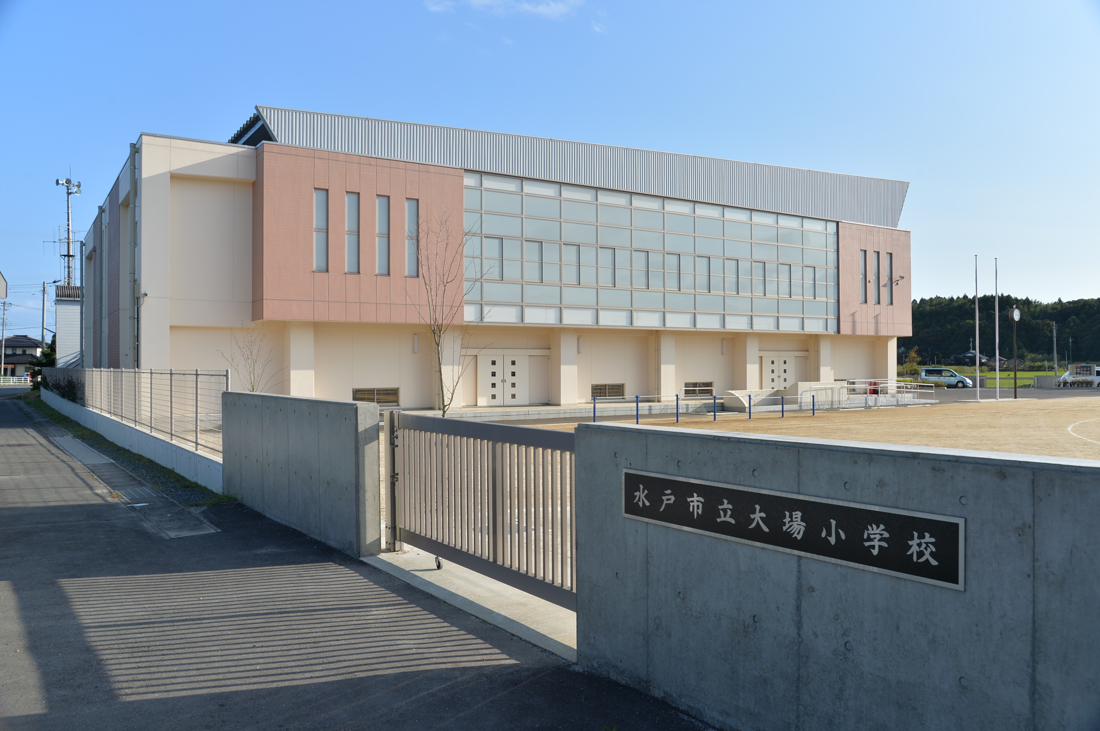 水戸市立大場小学校の裏門（校庭門）